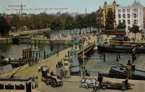 De Koningsbrug in Rotterdam. Foto van prentbriefkaart uit 1910, fotograaf onbekend.